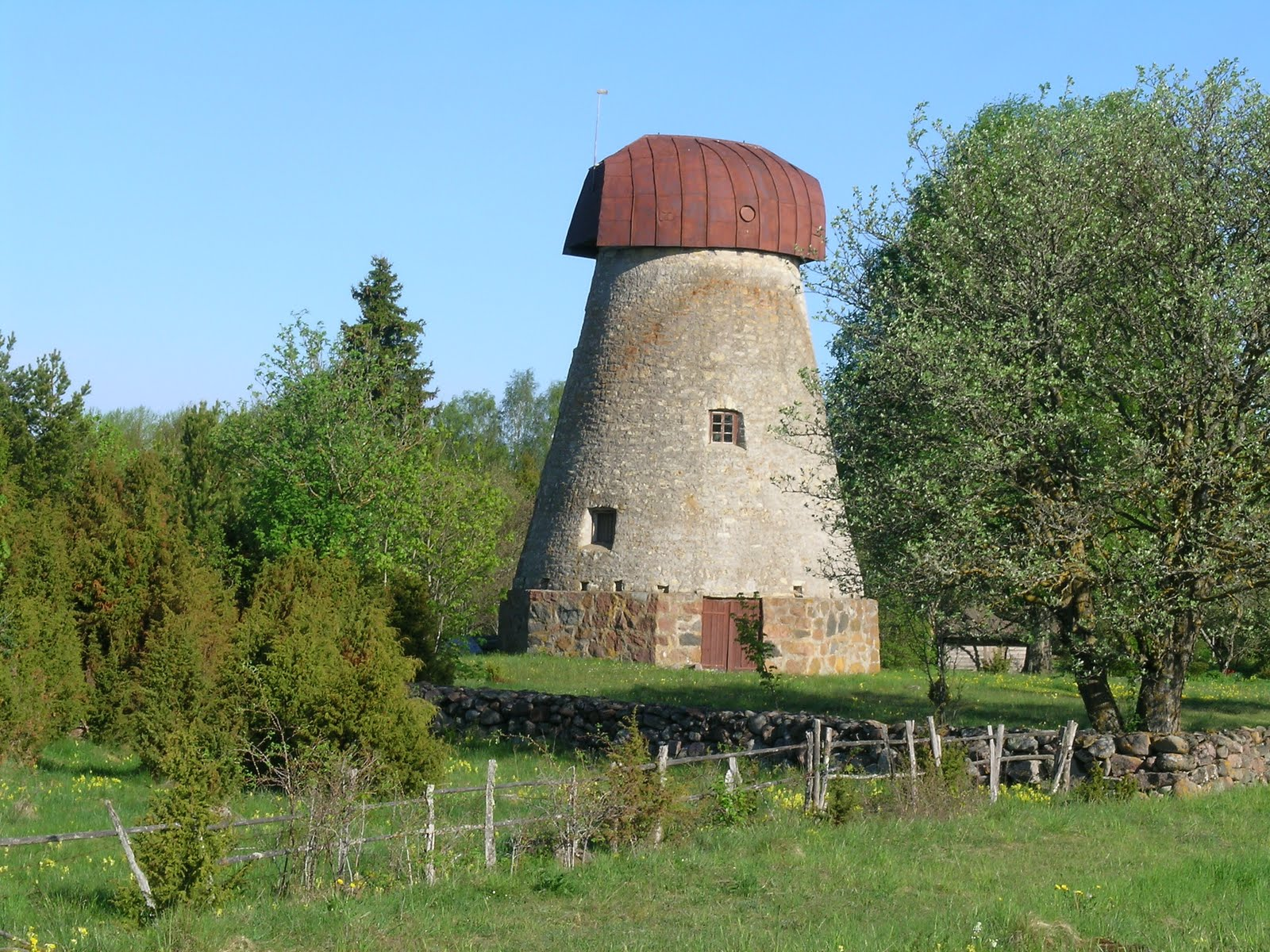 Veski talu tuulik